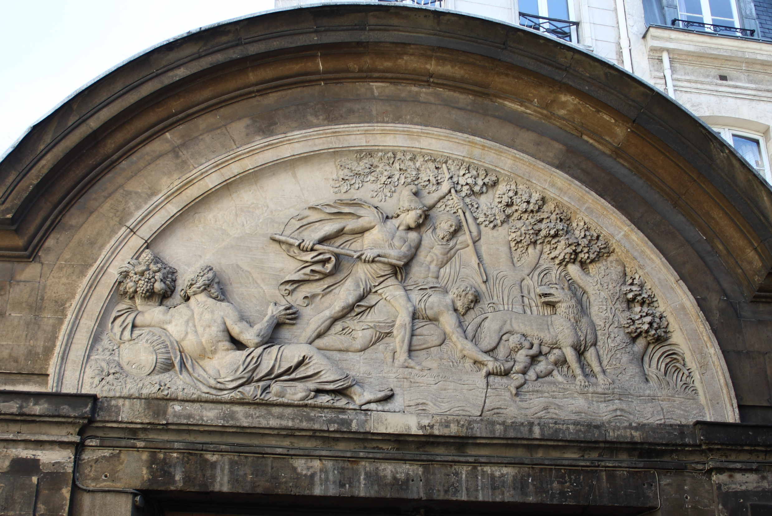 Hôtel Amelot de Bisseuil (47, rue Vieille-du-Tempel bzw. 10, rue des Guillemites im 4. Arrondissement von Paris), Relief des Tympanons auf der Innenseite des Eingangsportals, Darstellung: Romulus und Remus und der Hirte Faustulus